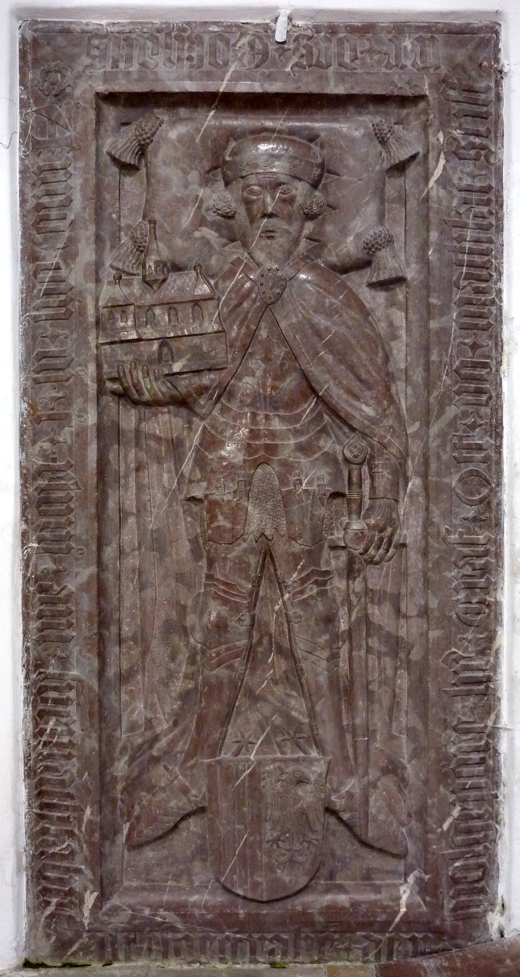 Pfarrkirche Mariä Himmelfahrt, ehem. Zisterzienserstiftskirche, Stift Baumgartenberg, Oberösterreich - Epitaph des Kostergründers Otto von Machland († 1148) im nördlichen Seitenschiff